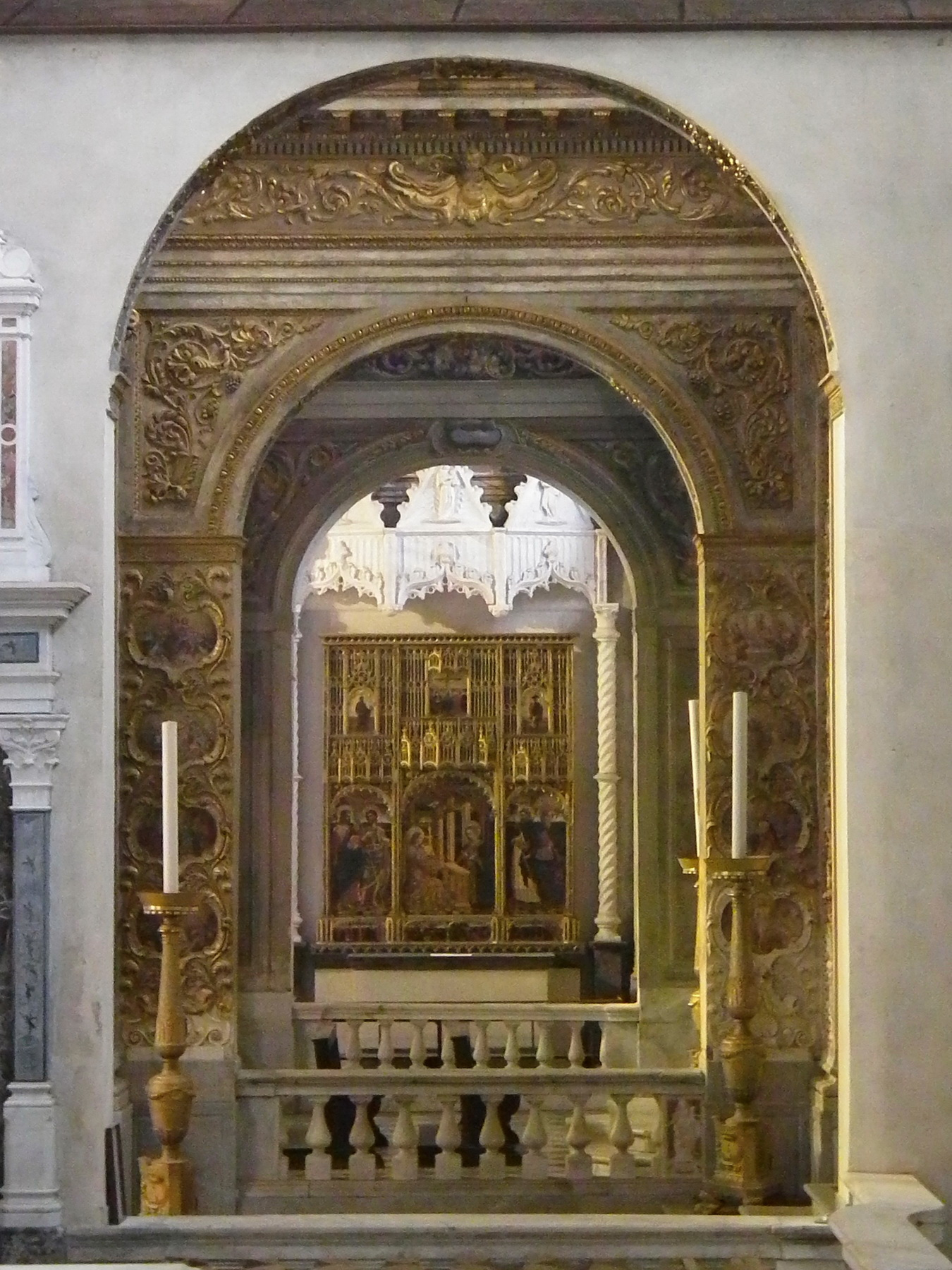 Chiesa di Santa Maria di Castello Native nameSanta Maria di CastelloLocationGenoa, Liguria, ItalyCoordinates44° 24′ 20.76″ N, 8° 55′ 44.39″ E Established1959Web page control : Q3674029 VIAF: 131794119 institution QS:P195,Q3674029